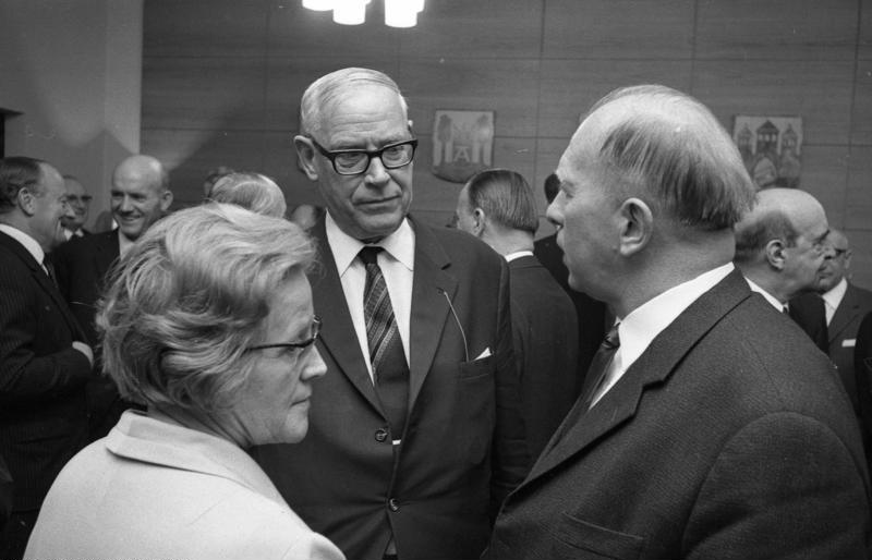 Empfang der La. Vertr. Niedersachsen anl. Geburtstag von Frau Min. Maria Meyer-Sevenich (v.l.n.r.: Bundesgesundheitsminister Frau Strobel; Ministerpräsident Dr. Zinn; Staatssekretär Dr. Fritz Schäfer, Bundesministerium für Angelegenheiten des Bundesrates und der Länder)